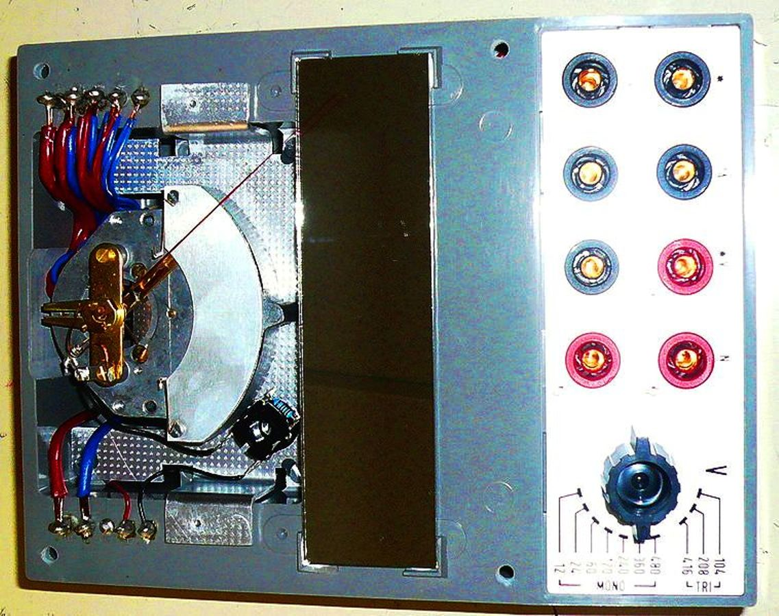 Elektrodinamikus wattmérő egy- és három fázisra, levegő csillapítással